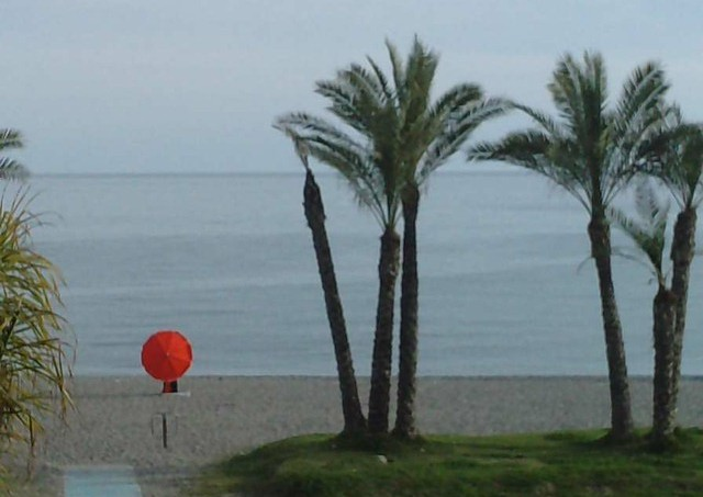 Almuñecarreko hondartza bat.